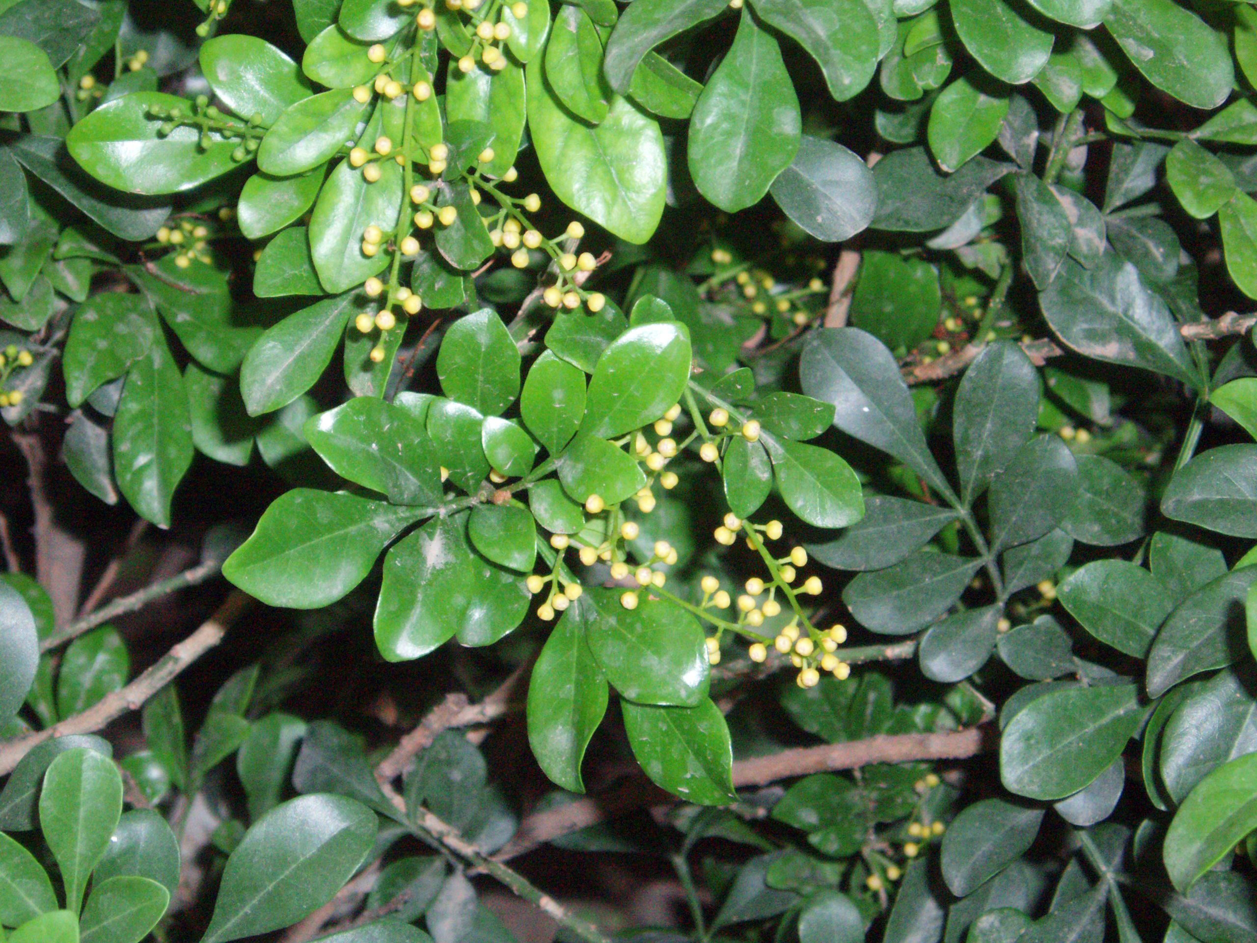 Aglaia odorata, Chinese perfume plant